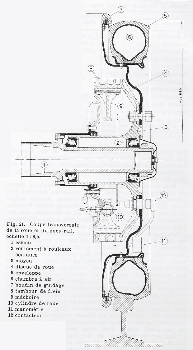 Voitures des CFF montées sur pneumatiques "Michelin": Coupe transversale de la roue et du pneu-rail